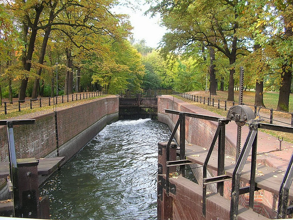 Stary Kanał Bydgoski. Śluza V "Czarna Droga"